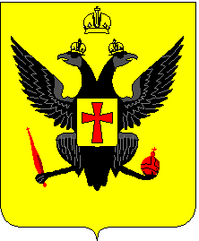 Герб Новоград-Волинського 1796 року